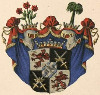 Ferseni suguvõsa vabahärravapp